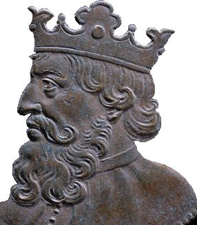 Auteur Dassier, Jean (1676-1763 ; médailleur) Titre Médaille Publication [Paris], [ca 1720] Description : bronze ; 31 mm ; 15,48 g Licence GPL et GFDL Notes Acq. 95-0638 Cote : BNF Richelieu Monnaies, médailles etantiques exemplaire unique L'ensemble est conservé dans deux boîtes cylindriques en buis. Tranche cannelée Identifiant 07700009 Détail du contenu : No d'image 1 Titre Chilpéric roy de France Notes 1720 Sujet(s) Chilpéric (539-584 ; roi de Soissons :Ier:+01+ Buste du roi à gauche ceint d'une couronne. Modifié par Rinaldum 11 jan 2004 à 21:27 (CET) Image trouvé sur le site Gallica de la BNF 11 janvier 2004 à 20:23 Rinaldum 286x326 (26222 octets) (Chilpéric roy de France.)